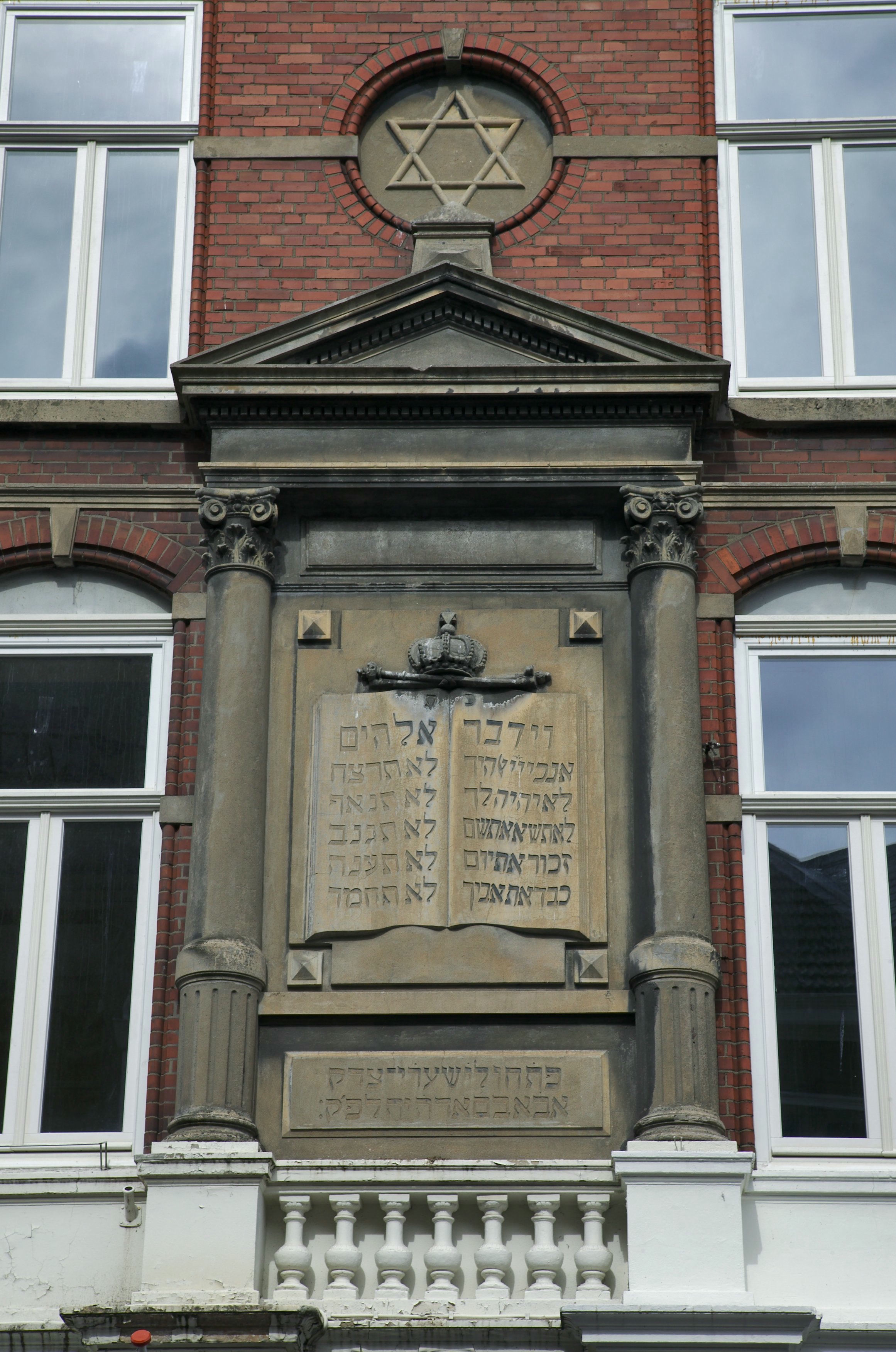 Voormalige synagoge: Close-up van de voorgevel van de voormalige synagoge te Roermond met de Tien Geboden en daarboven een rond venster met een Davidster